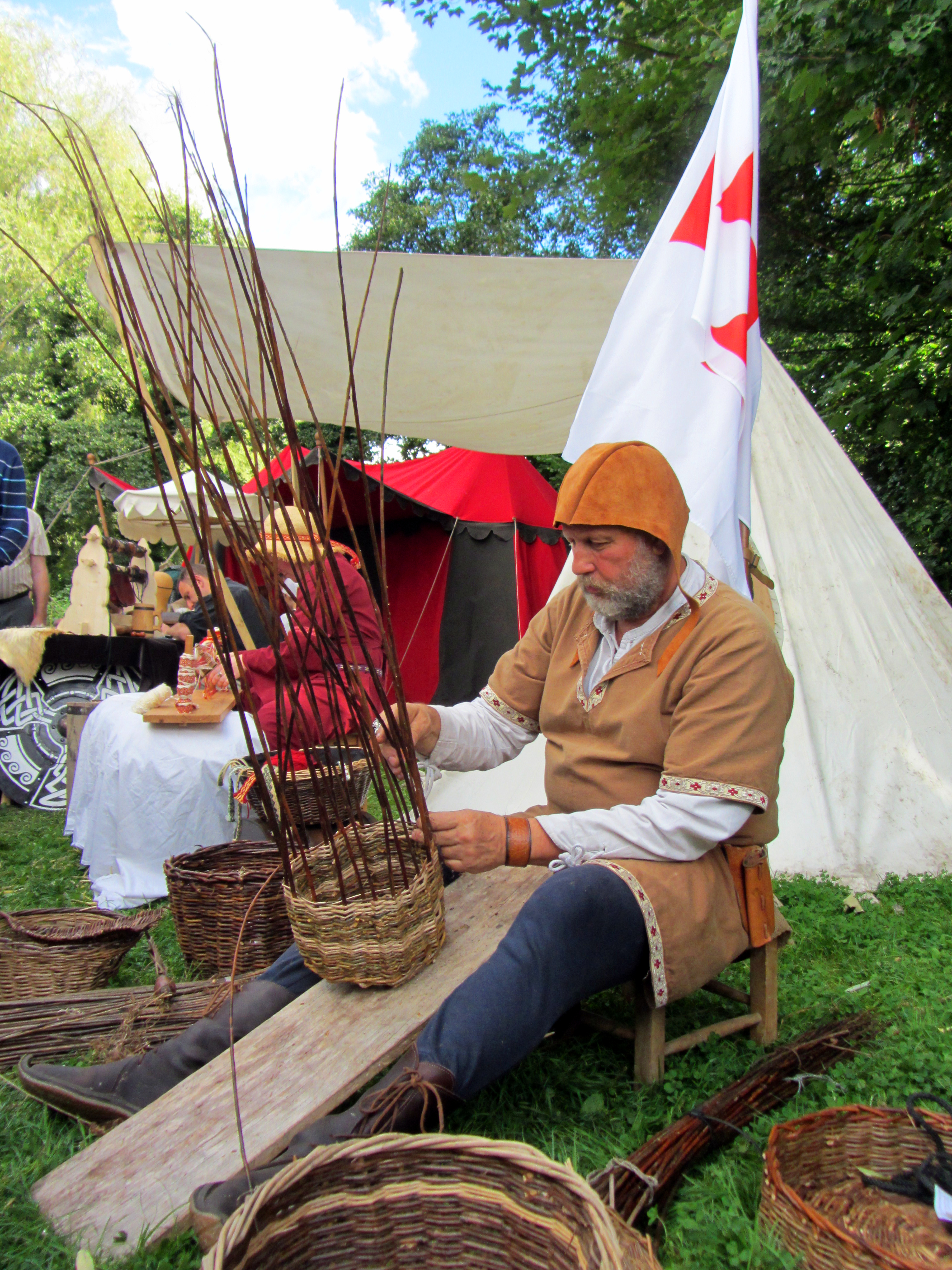 Fête au bord de l'eau 2013 à Amiens - 23ème édition. Photo prise au parc Saint-Pierre.